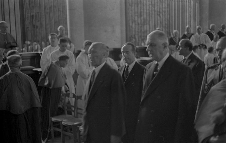 Reims / Frankreich Reise von Bundeskanzler Konrad Adenauer nach Frankreich Messe in der Kathedrale von Reims mit de Gaulle und Bundeskanzler Adenauer